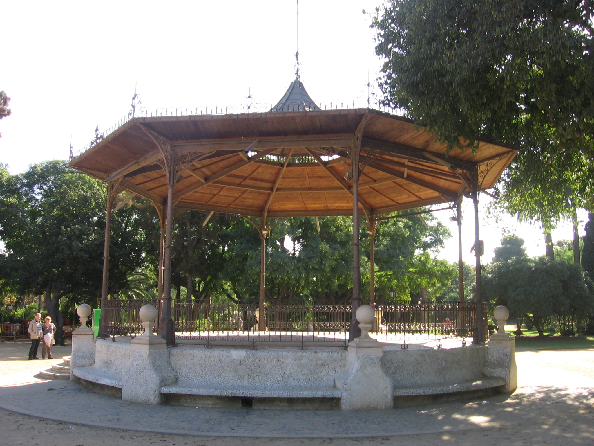 Glorieta de la transexual Sònia.